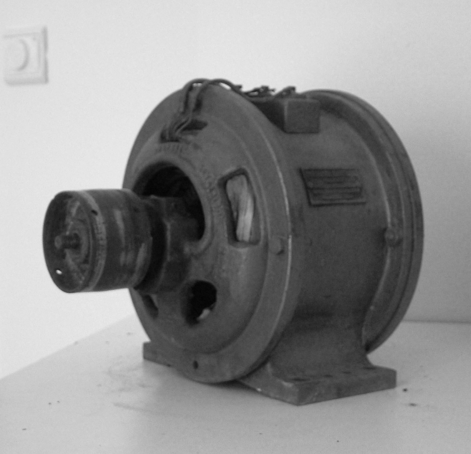 Première série (de 1899 à 1915 environ.)